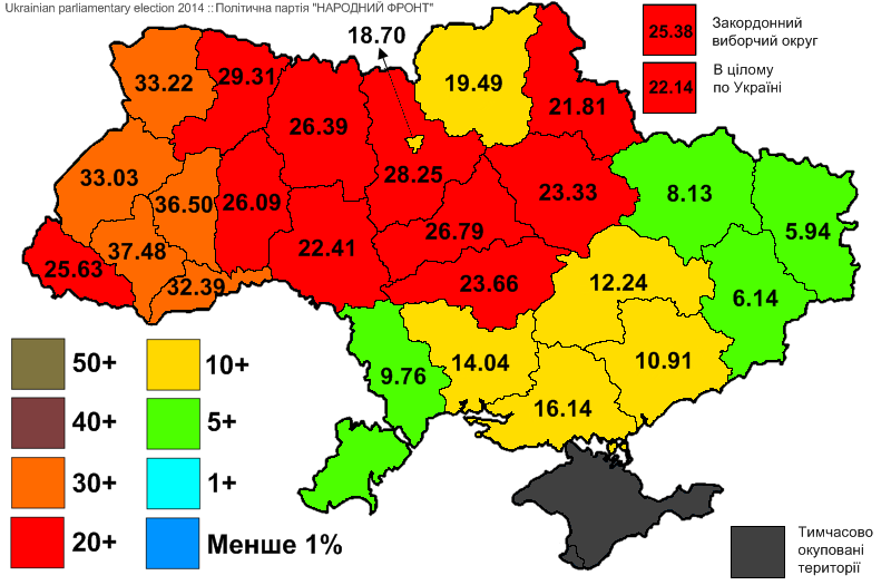 Результати виборів до Верховної Ради України, які відбулись 25 жовтня 2014 року. Інформація з офіційного сайту ЦВК. Політична партія "НАРОДНИЙ ФРОНТ".